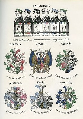 KSC in der WSC-Chronik